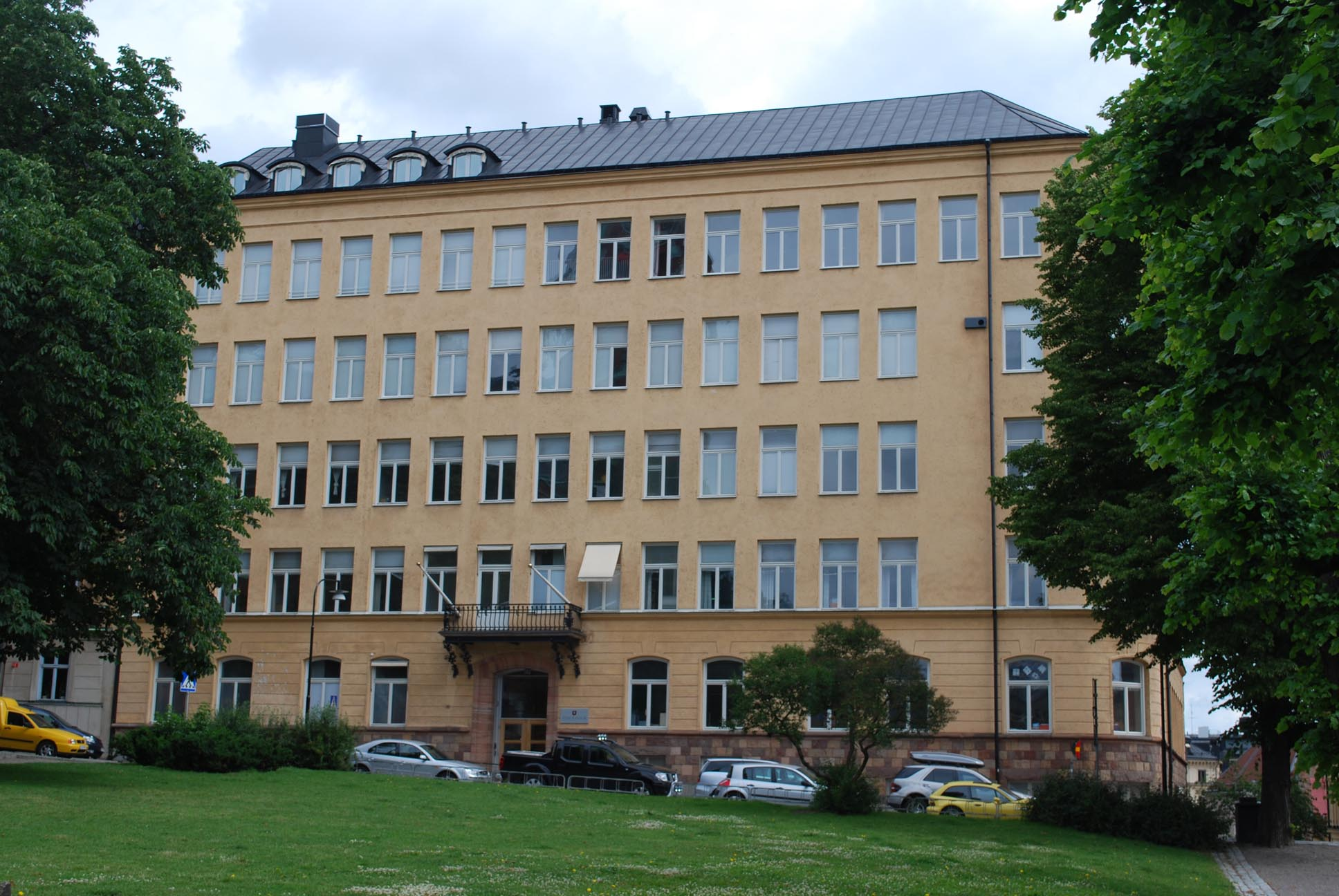 Stockholm International School, tidigare Brummerska skolan